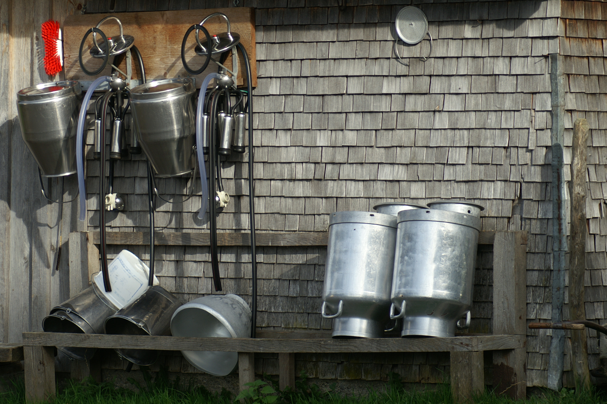 Melkgeschirr, Melkutensilien, Melkmaschine - Stilleben in Schönenbach im Bregenzerwald